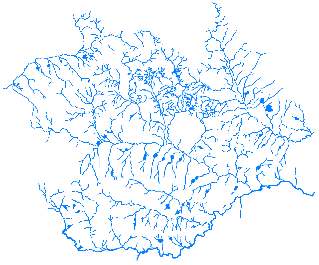 Mapa hidrográfico de Santa Maria (Rio Grande do Sul) Apresenta todos os cursos d'água, barragens, rios, etc do município OBS: Esse ficheiro foi indevidamente apagado do commons. Ele é de minha autoria (Imagens SM) e foi feito especialmente (mas não necessarialmente exclusiva) pra wikipédia.